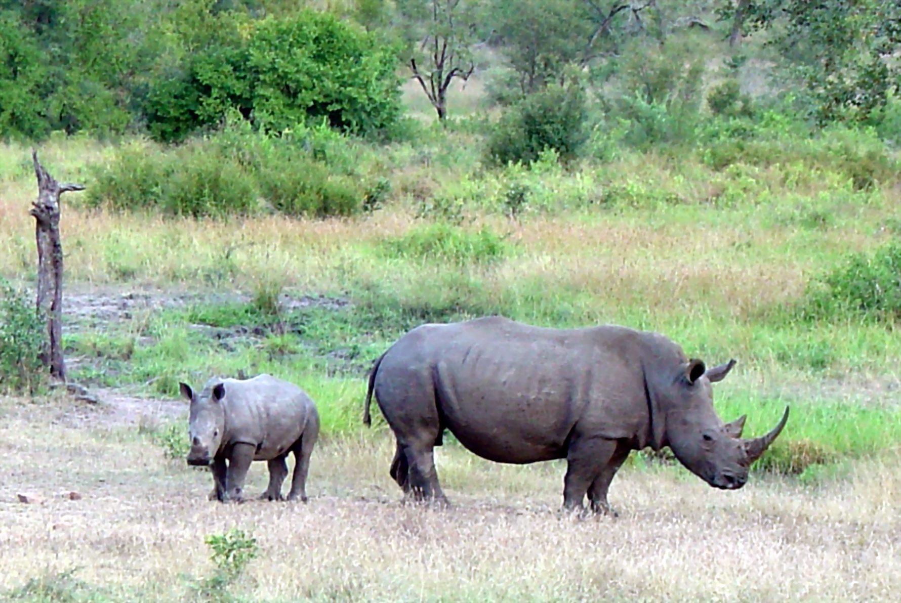 FÊMEA DE RINOCERONTE E FILHOTE NA SAVANA AFRICANA, SINGITA GAME RESERVE, PROVÍNCIA DO LIMPOPO, ÁFRICA DO SUL